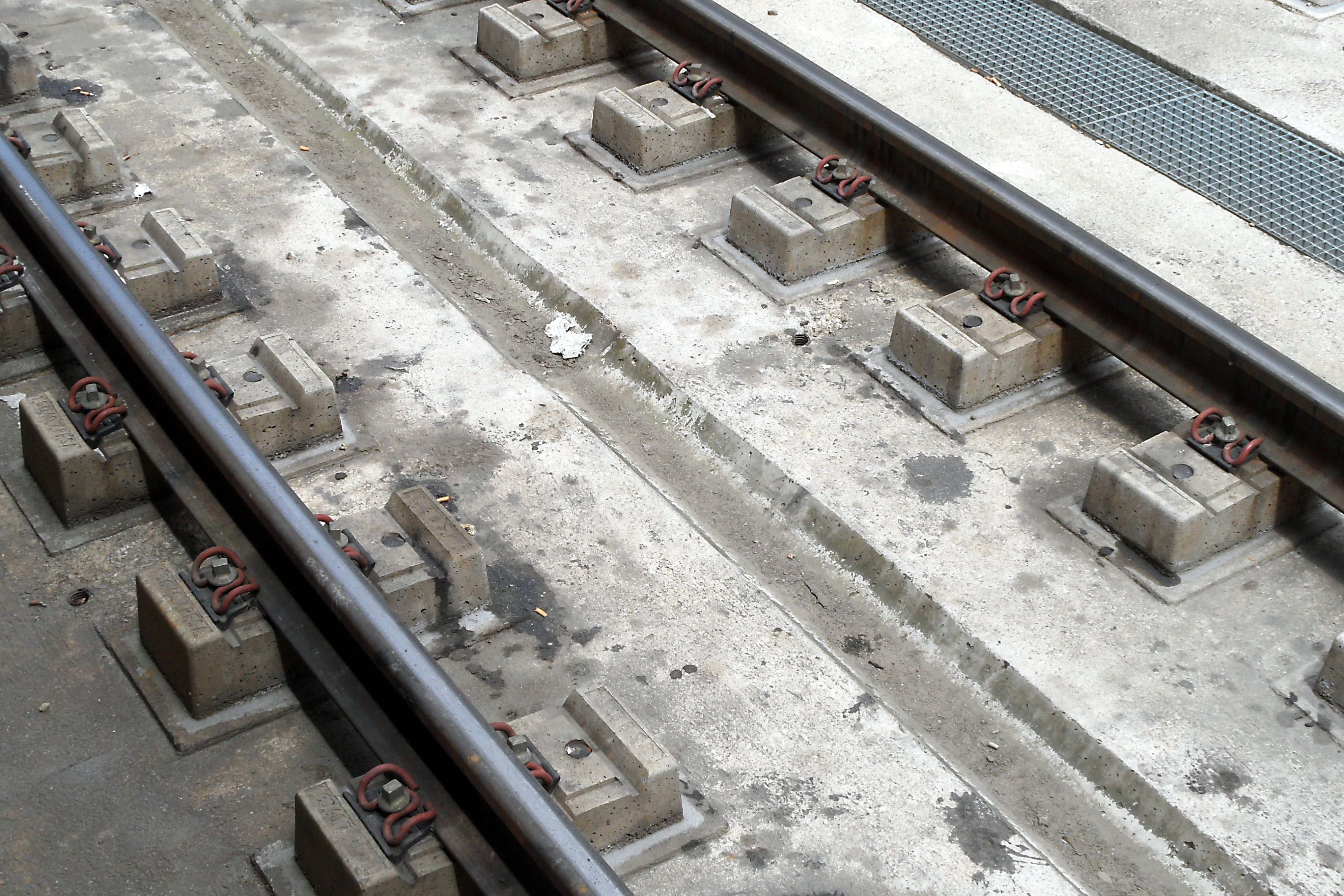 Bf Madrid Chamartín, Gleis 15. Das Gleis in iberischer Breitspur ist mit doppelten Schienenbefestigungen der Oberbauart W für die Umspurung auf Regelspur vorbereitet.Zum Umspuren muss man die Schienenbefestigungen vollständig entfernen, die Schienen anheben, die Blindstopfen von den bisher ungenutzten auf die ab sofort nicht mehr benötigten Dübel umsetzen, die Winkelführungsplatten mit Zwischenlagen in die neuen Aufnahmen einsetzen, die Schienen auf die neue Position ablassen und mit den Spannklemmen und Schwellenschrauben wieder verspannen.